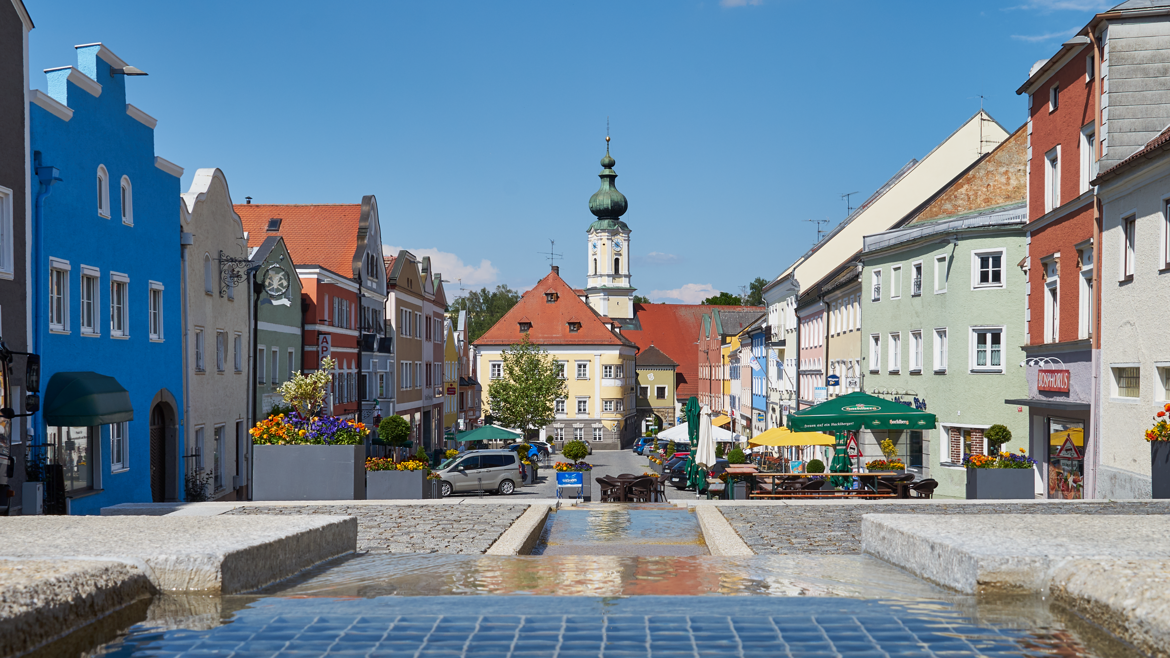 Der Marktplatz in Rotthalmünster mit der Sichtachse Rathaus - Pfarrkirche Mariä Himmelfahrt